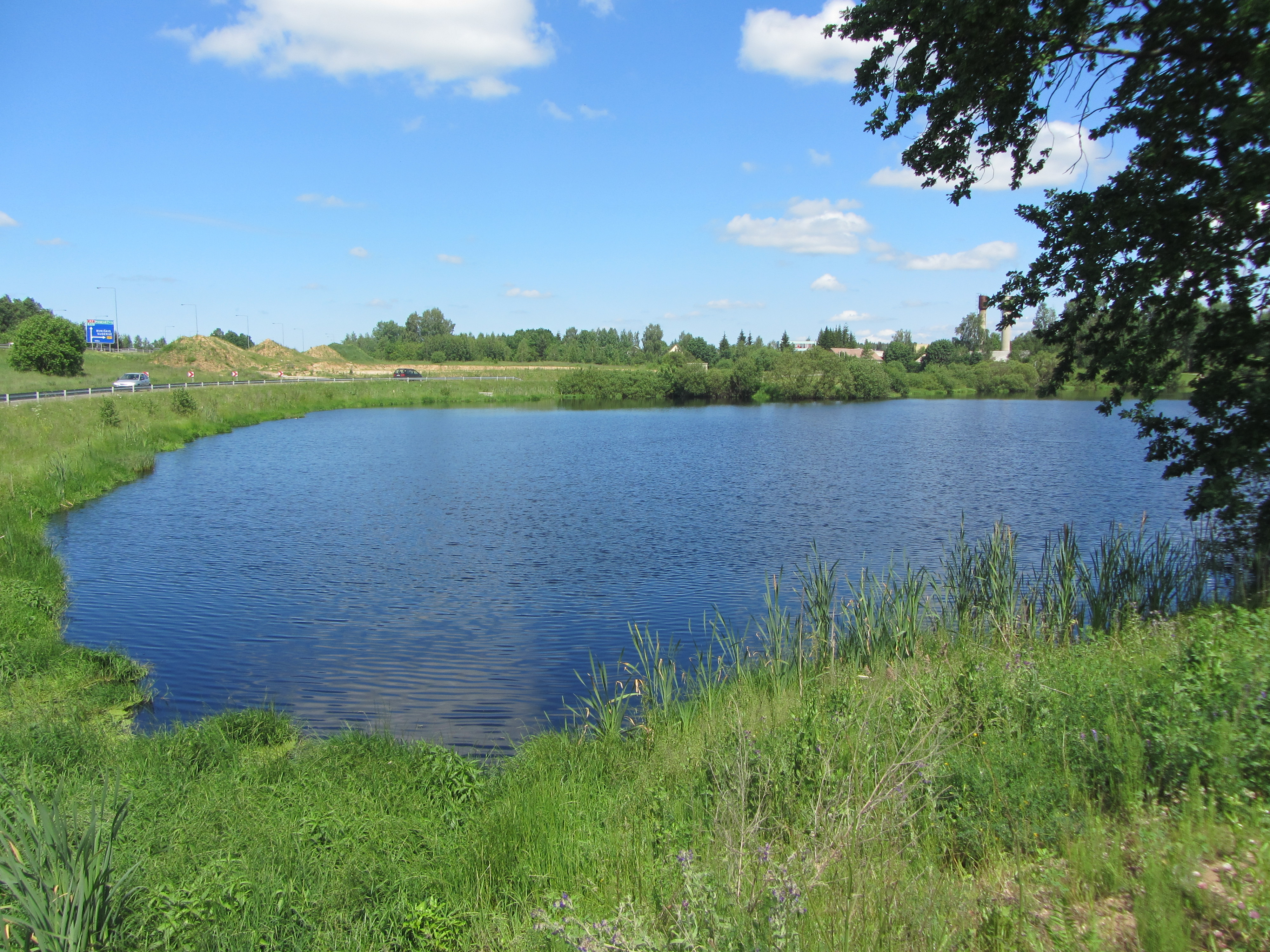 Avižieniai, Lithuania